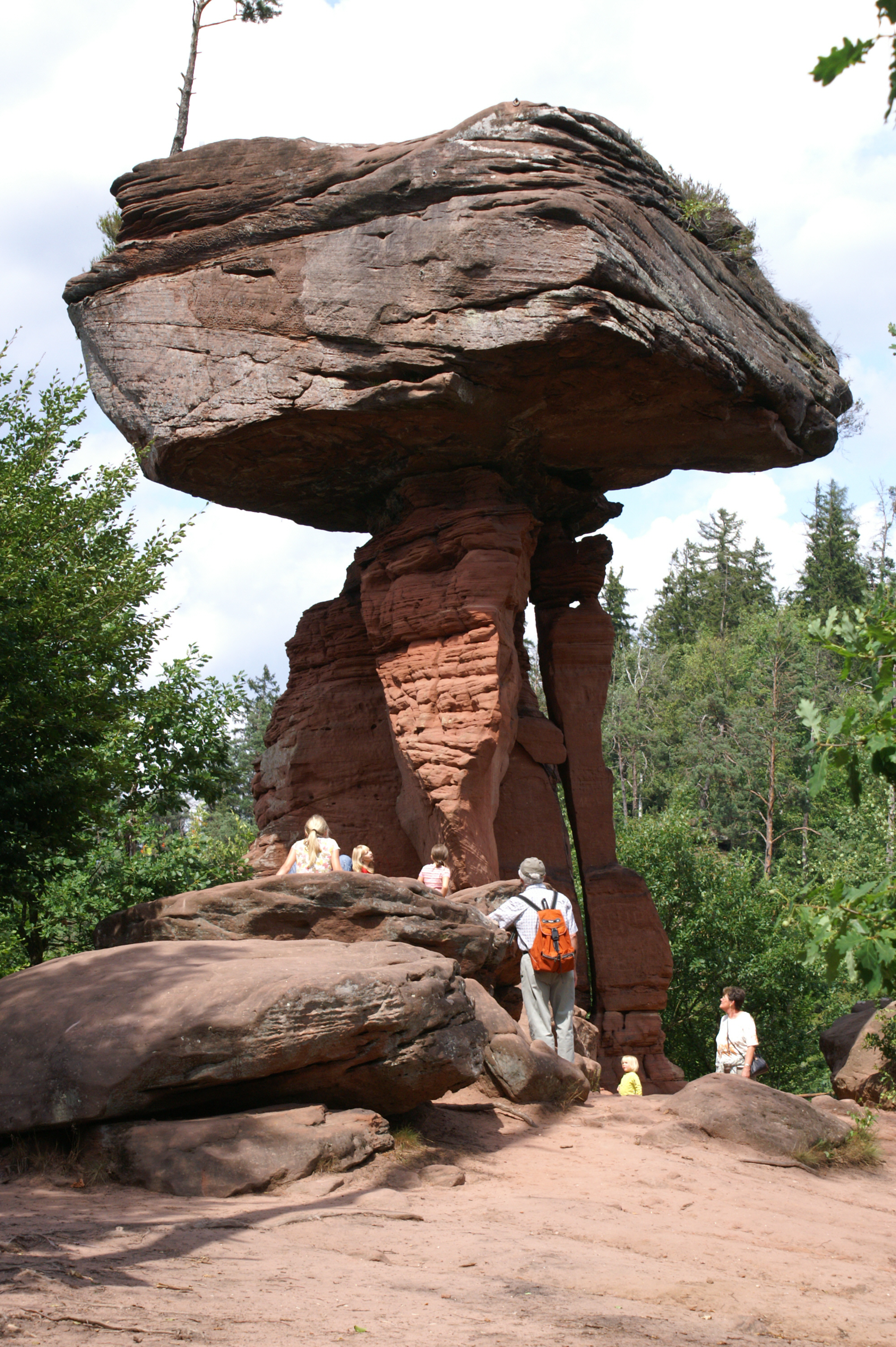 Deutschland, Rheinland-Pfalz, Kaltenbacher Teufelstisch in Hinterweidenthal